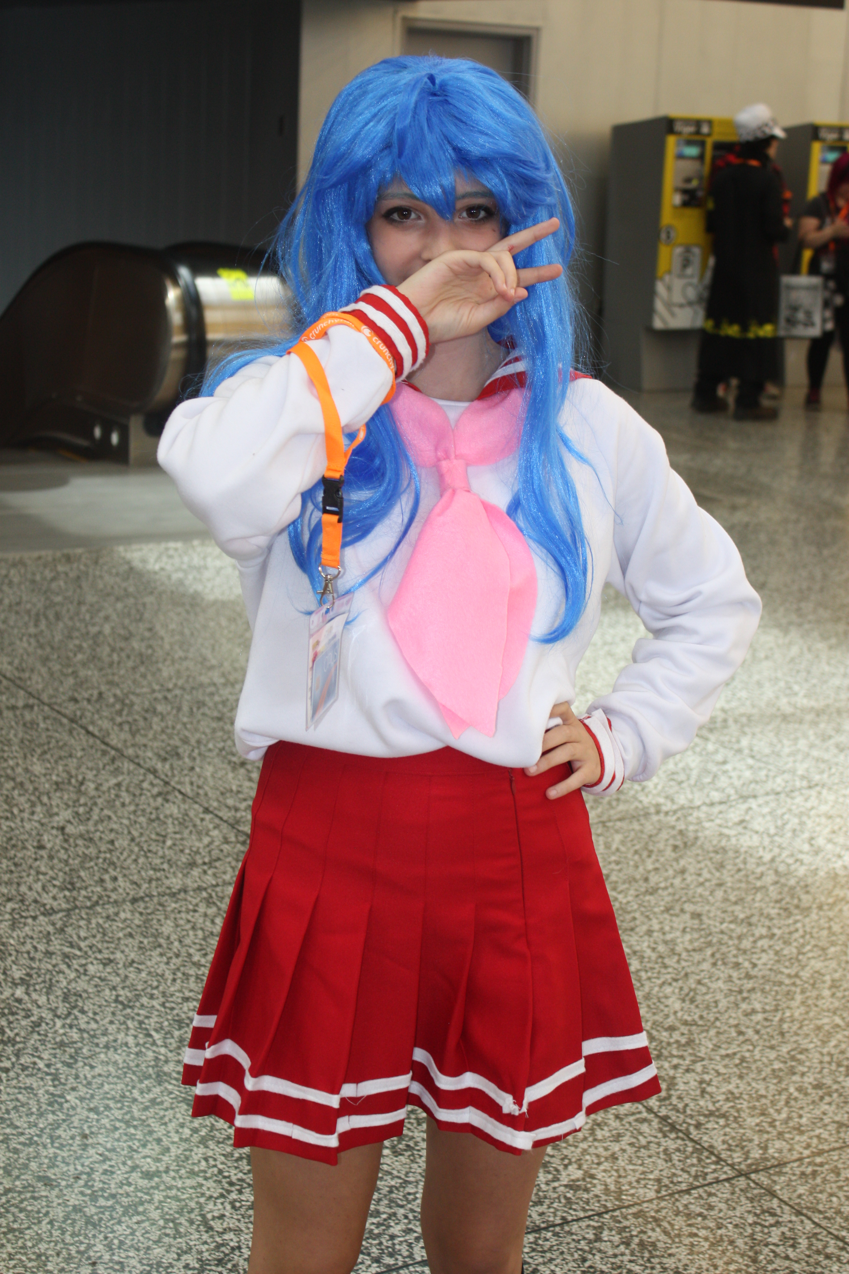 Otakuthon 2015，《幸運☆星》泉此方cosplayer。